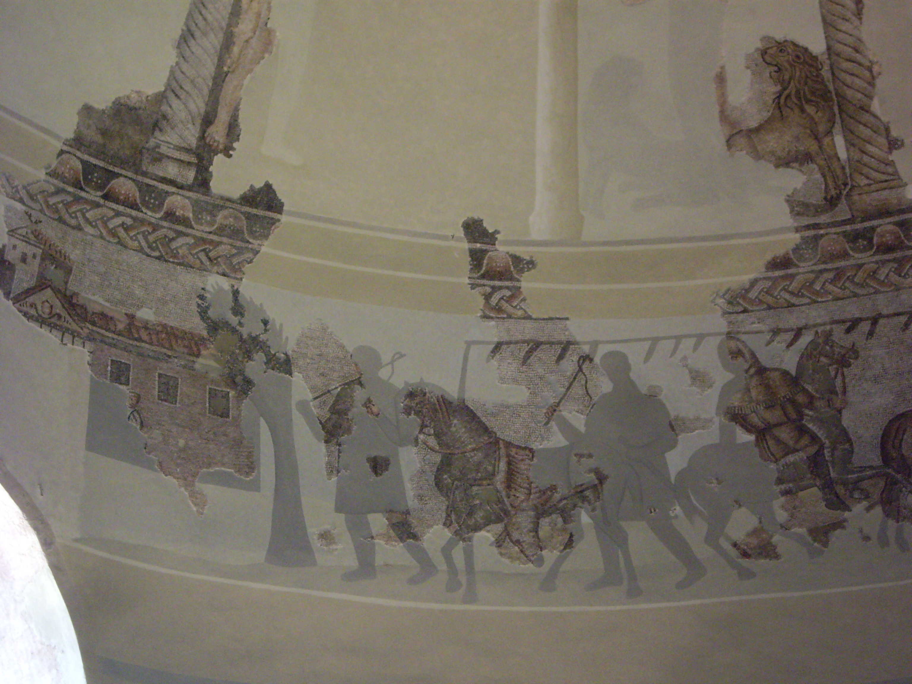 escenes de cacera al primer fris de mosaics de la cúpula. A l'esquerre de la imatge s'hi pot observar una villa i a la part superior dreta, l'escena bíblica de Daniel entre els lleons.